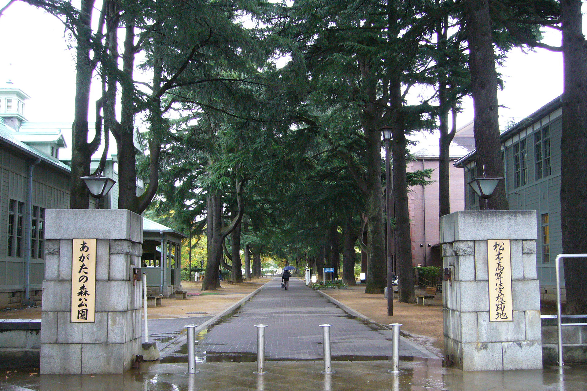 Agata-no-mori park in Matsumoto, Japan